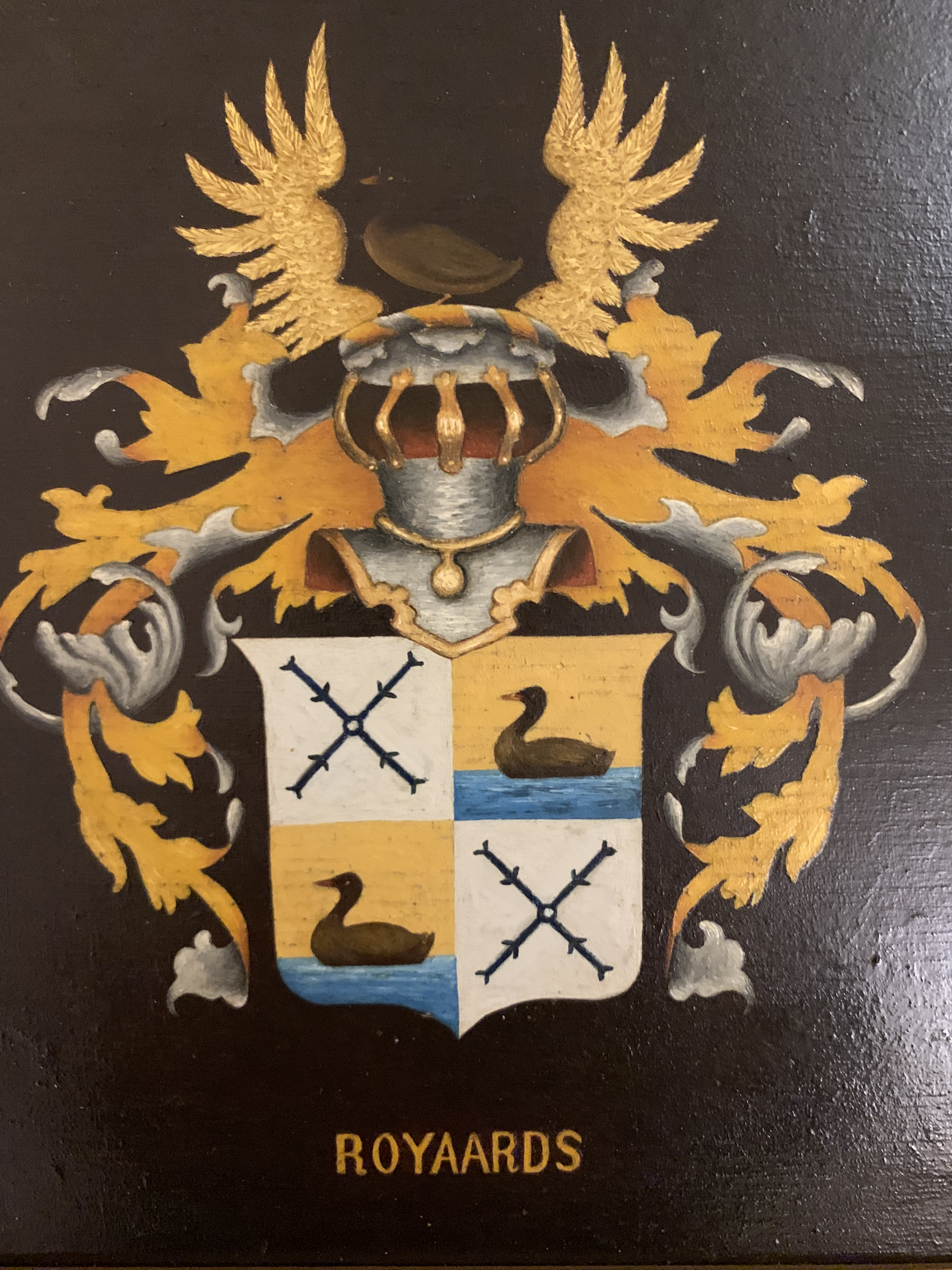 Dit is een foto van het geregistreerde familiewapen.